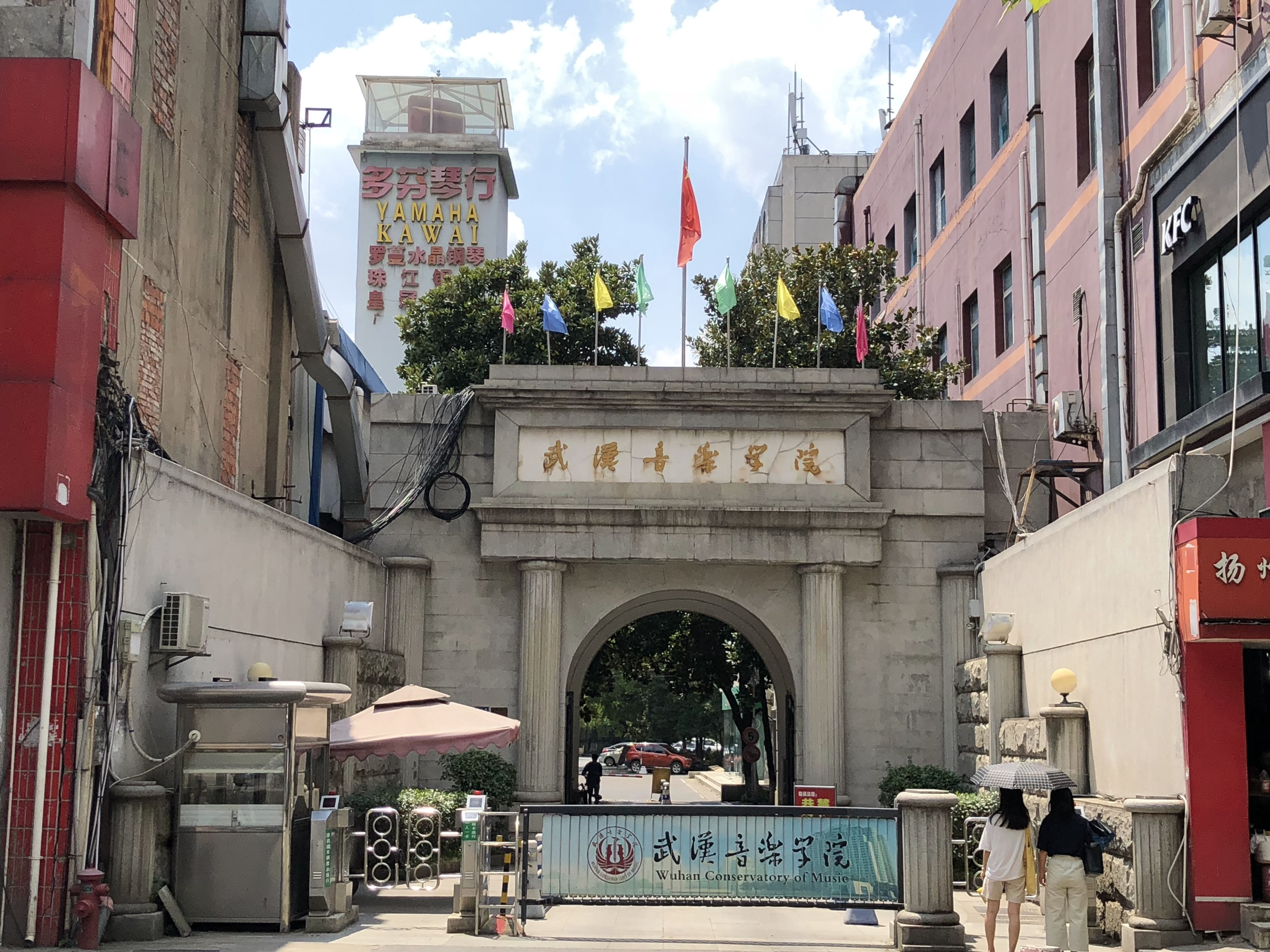 中文（中国大陆）: 武汉音乐学院 门